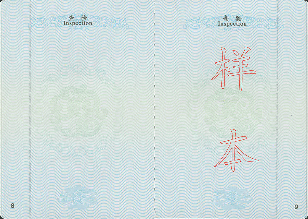 中華人民共和國多次出入境有效出入境通行證查驗頁